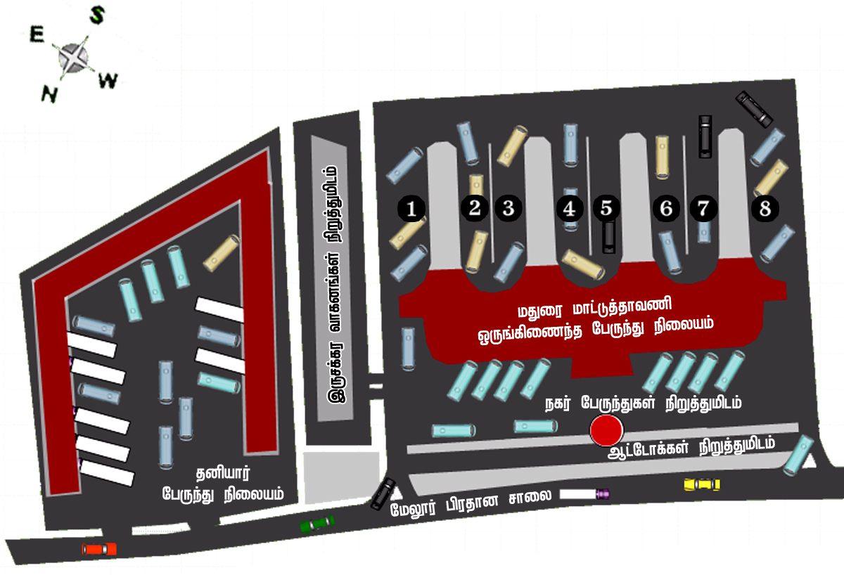 மதுரை, மாட்டுத்தாவணியிலுள்ள ஒருங்கிணைந்த பேருந்து நிலையத்தின் மாதிரி வரைபடம்